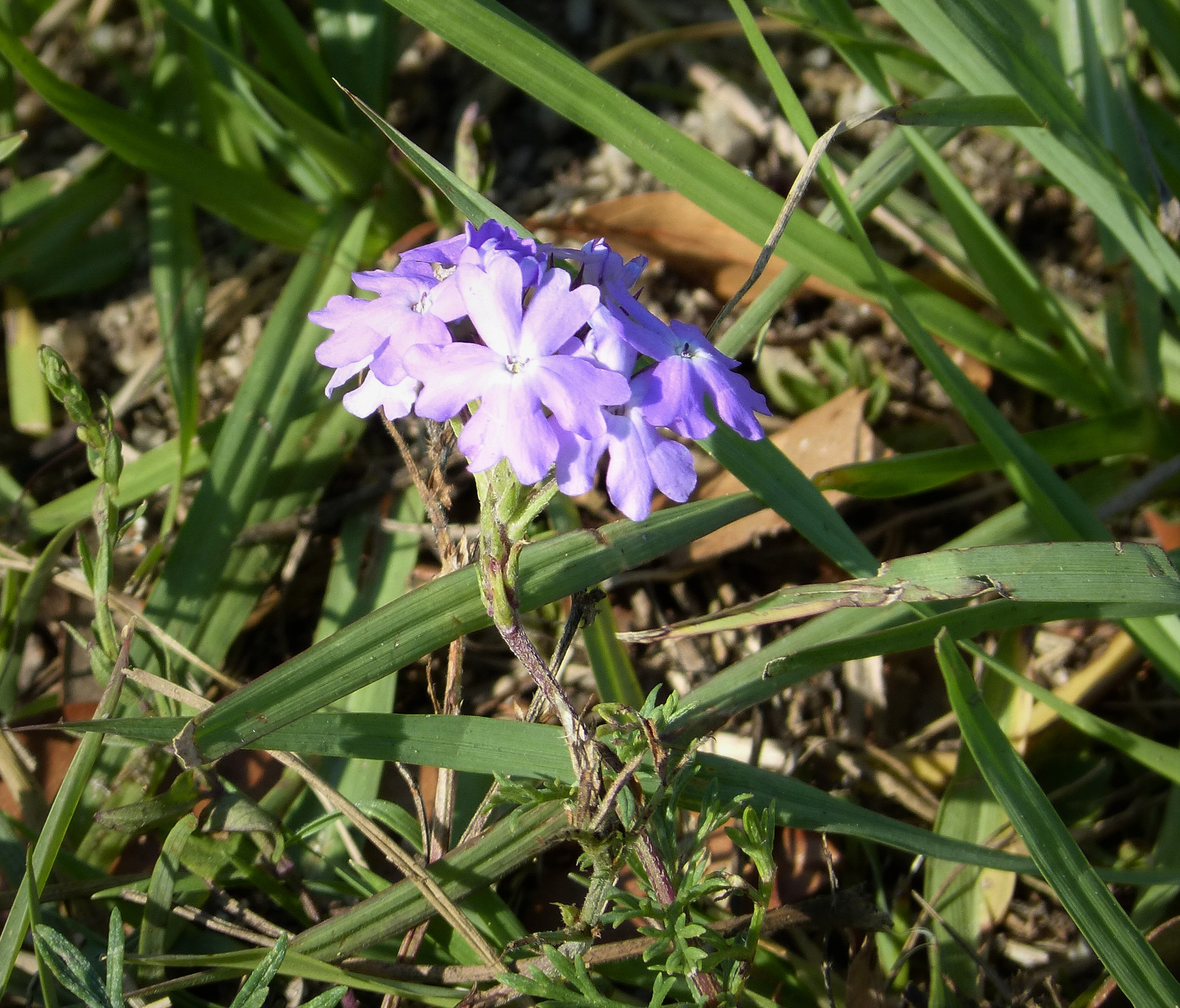 Savannah, Georgia USA